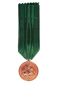 Italian miltary medal "medaglia Mauriziana"